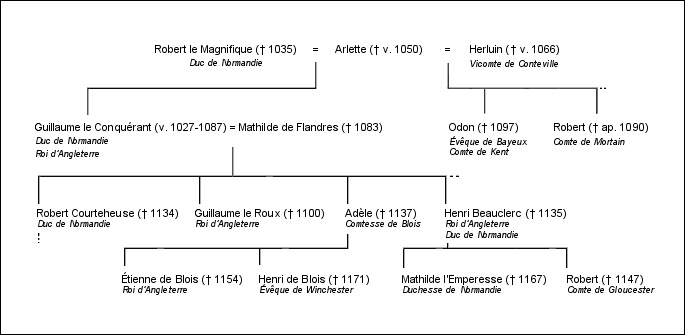 Descendance sur 3 générations de Robert le Magnifique († 1035), duc de Normandie, pour montrer les parentés des protagonistes de la guerre civile anglaise dite l'Anarchie.